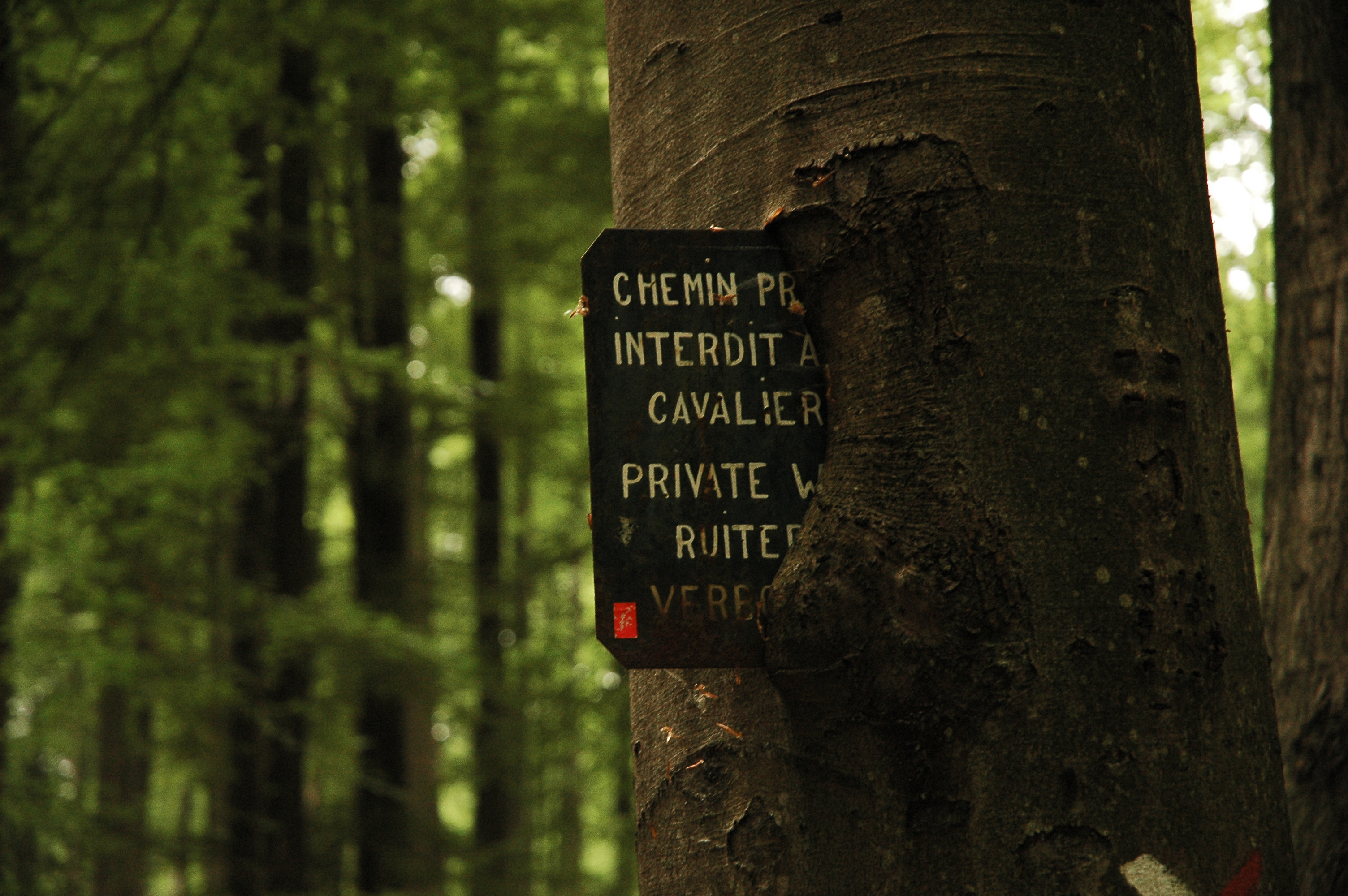 Tronc